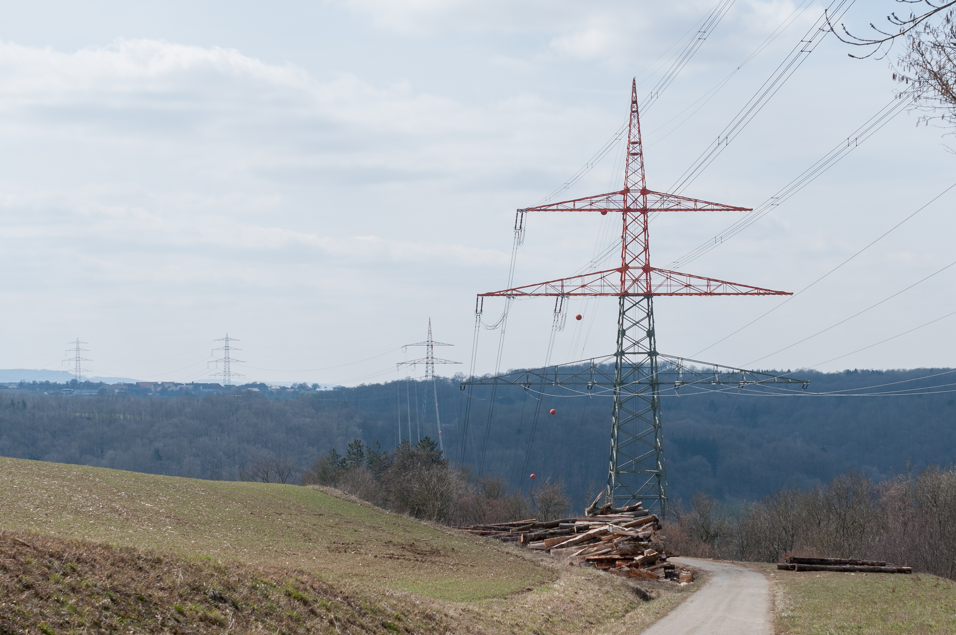 Weitabspannmast der EnBW. Die Freileitung überquert das Kochertal beim Künzelsauer Ortsteil Morsbach. Blick auf den Mast aus nördlicher Richtung, von Amrichshausen kommend.